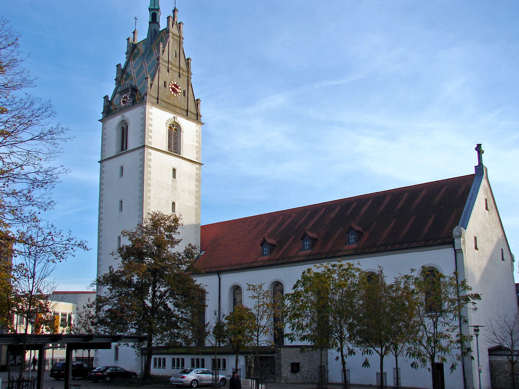 Nikolauskirche Friedrichshafen